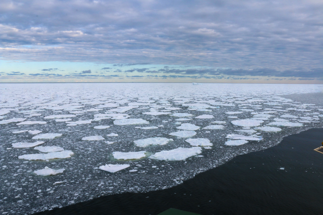 Wer glaubt, dass es in unserer globalisierten Welt keine Abenteuer für Forscher mehr gibt, der kann sich eines Besseren belehren lassen und sich an einer Expedition in die Antarktis beteiligen. Für die Expedition GANOVEX 11 sind im Dezember 2015 drei Forscher des DLR-Instituts für Planetenforschung in Berlin in Richtung Südpol aufgebrochen, um für die internationale Planetenforschung noch unbekannte antarktische Gebiete zu erkunden und gemäß ihrer geologisch-geomorphologischen Besonderheiten mit Strukturen auf dem Mars zu vergleichen. Zur Blogreihe #ExpeditionAntarktis